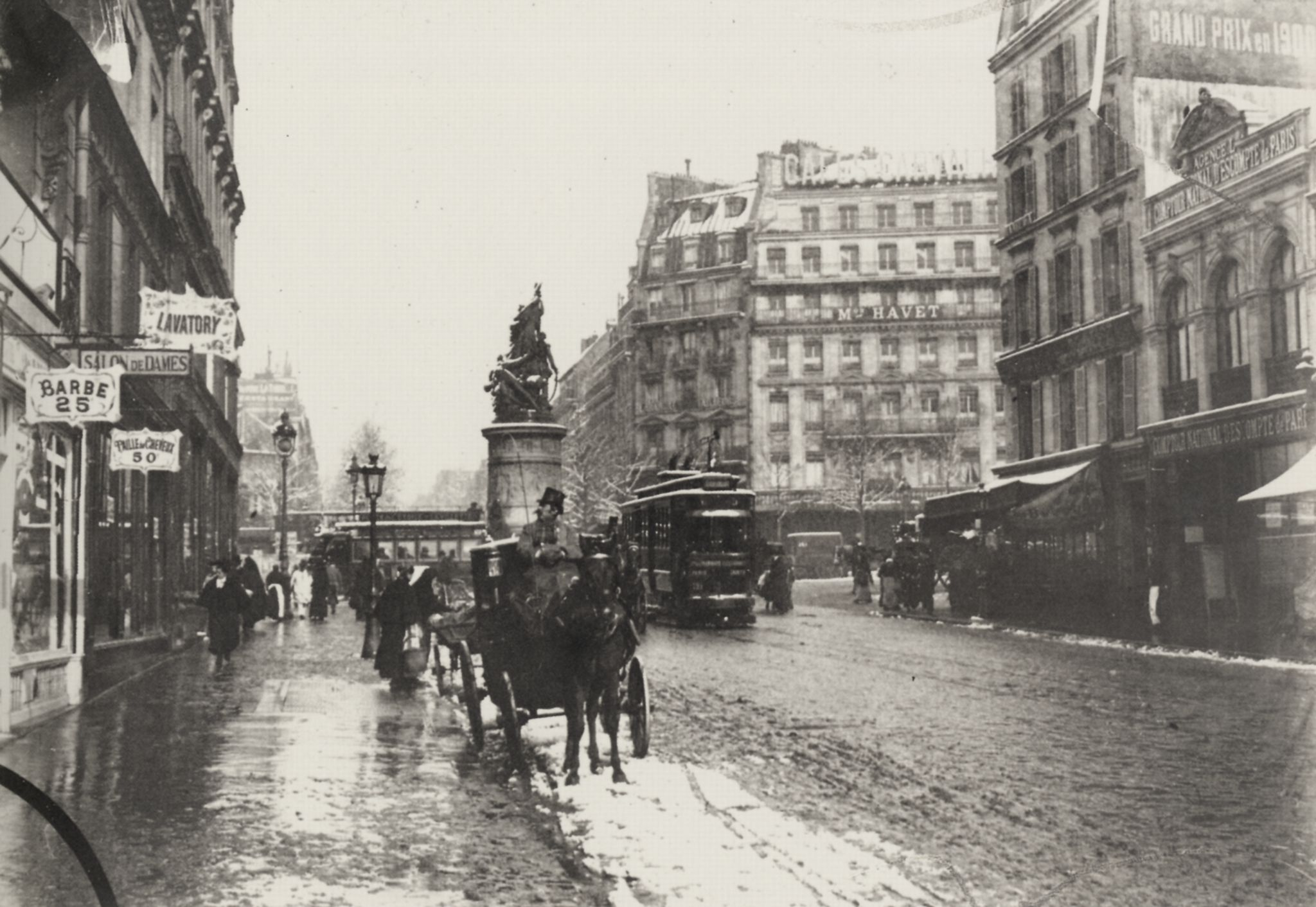 Zola, Francois Emile: Place Clichy